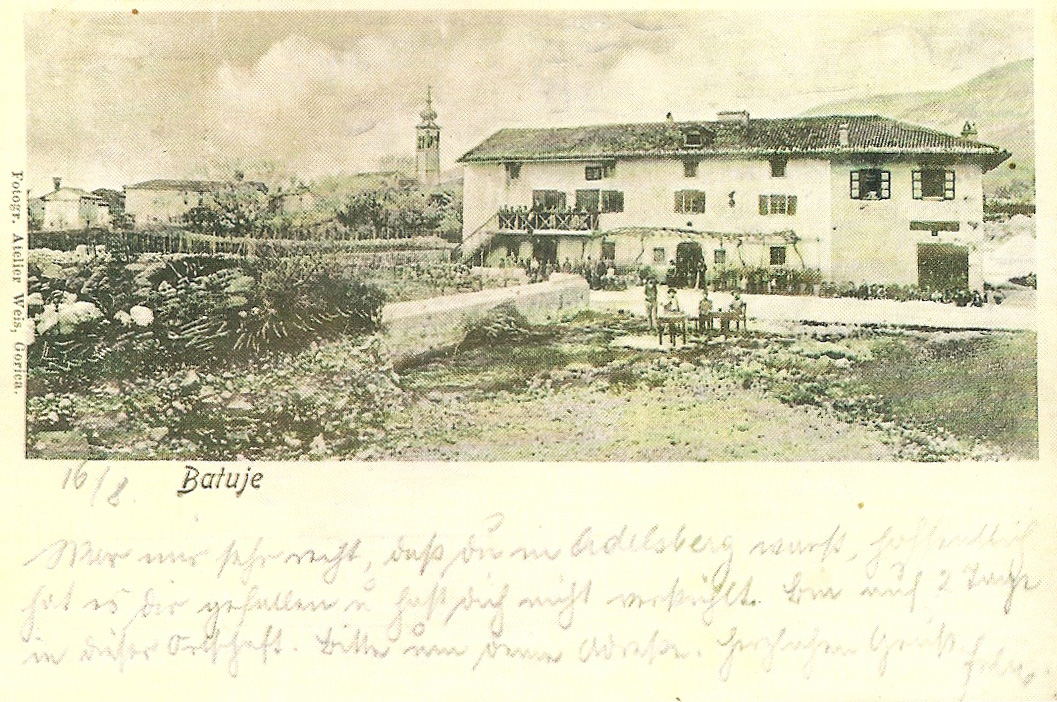 Razglednica Batuj.